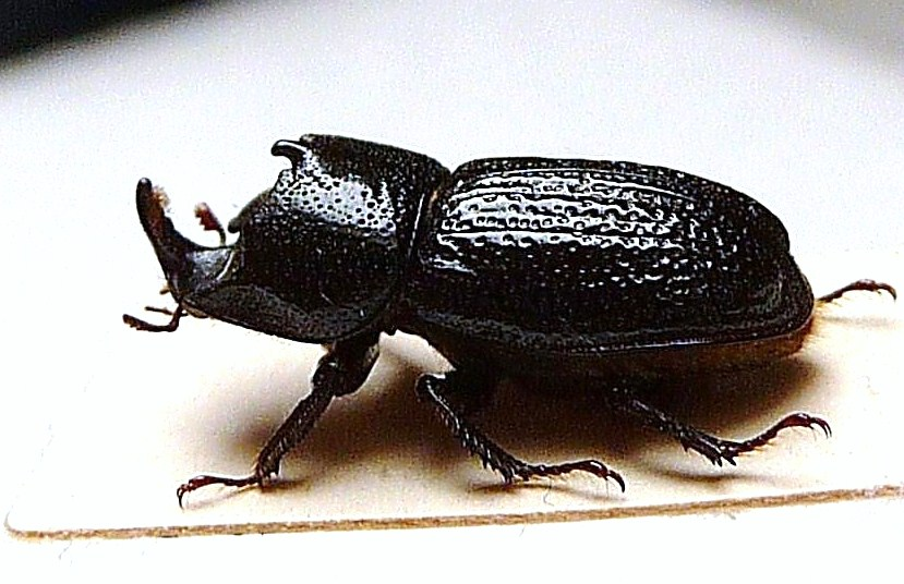 Kopfhornschröter (Sinodendron cylindricum), Männchen seitlich